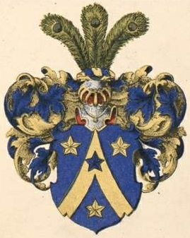 Gaveli suguvõsa aadlivapp